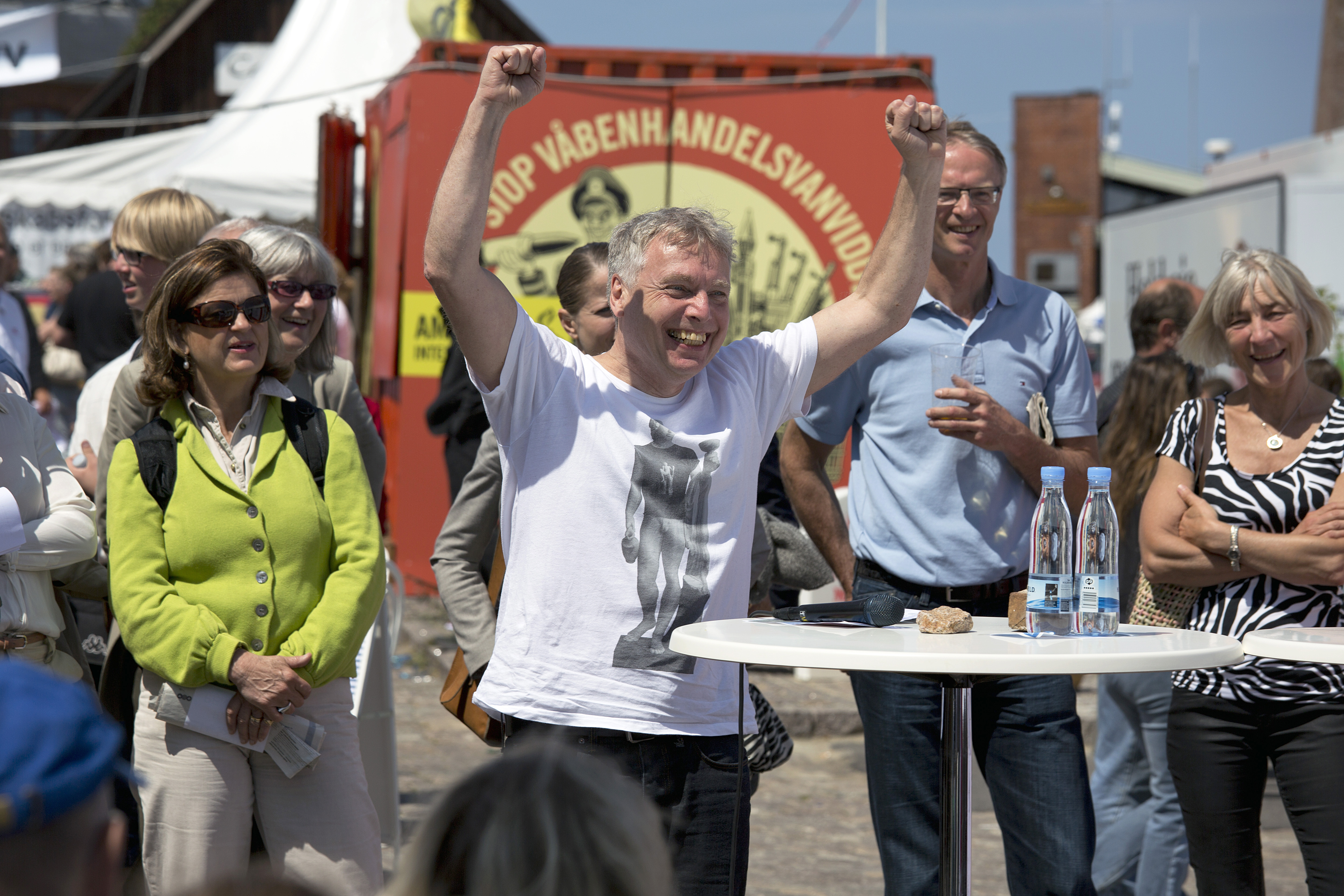 Uffe Elbæk, Danmarks kulturminister, Folkemødet, Allinge, Bornholm.